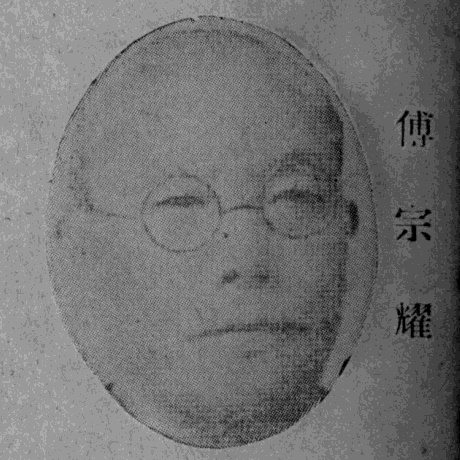 《民國名人圖鑑》肖像